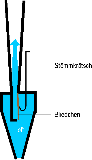 schematesche Längsschnett duerch eng Zongepäif